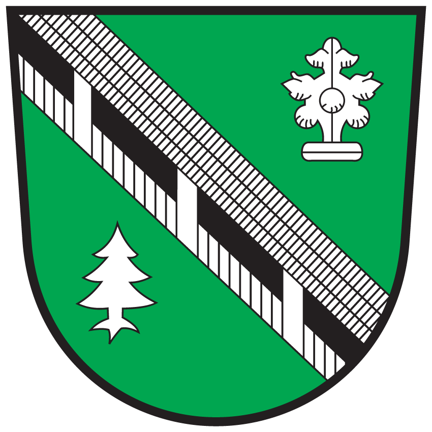 Wappen von Deutsch-Griffen